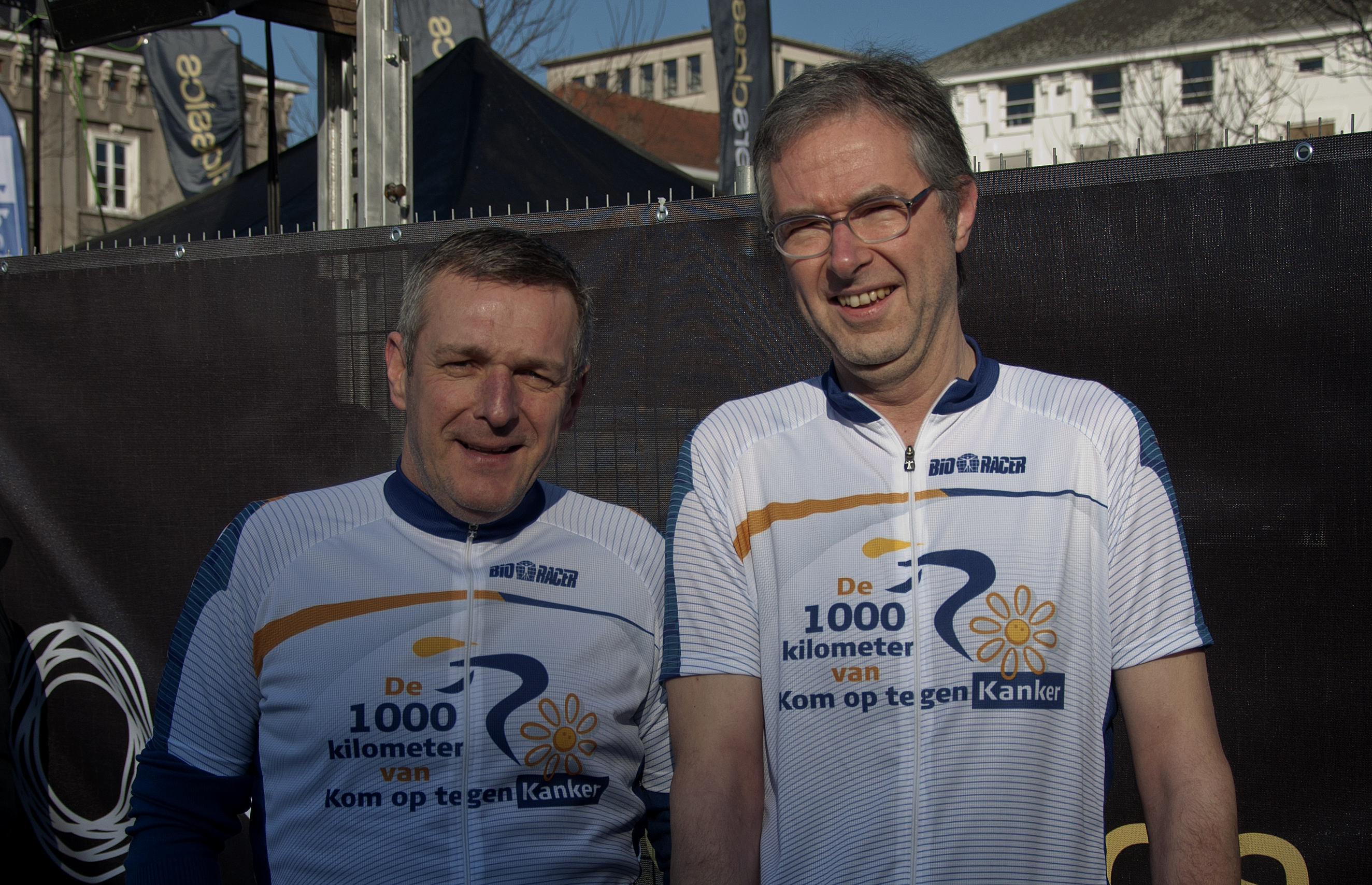 Leo Van Der Elst (links) en Jan Hautekiet terwijl ze "Kom op tegen kanker" promoten tijdens de Omloop Het Nieuwsblad 2012